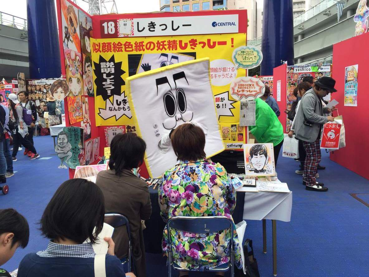 イベント時は座ってはいけないという縛りがある。